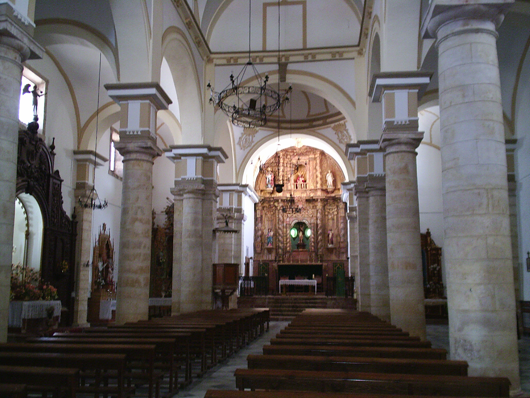 Iglesia de San Sebastián en Cañete La Real - Málaga - España